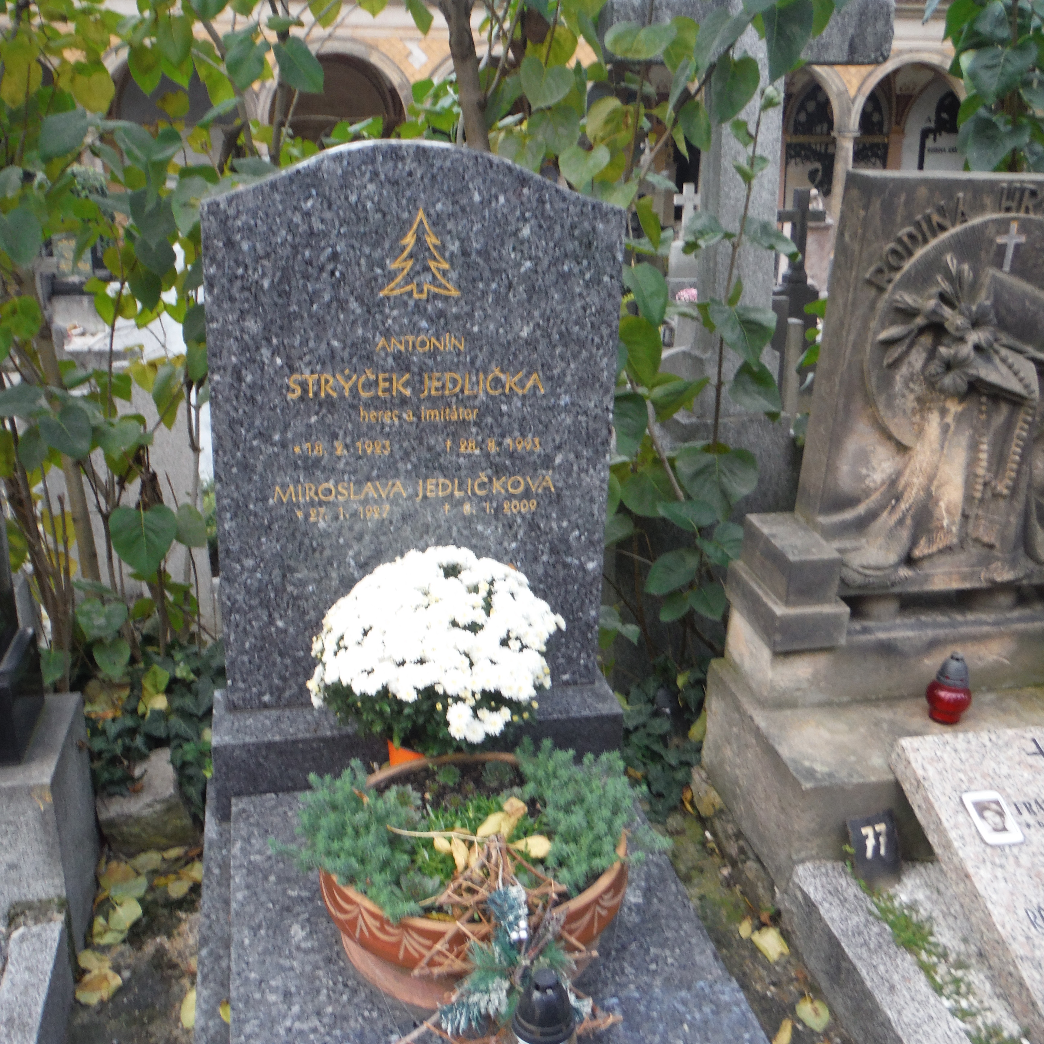 Hrob Antonína Jedličky, českého herce